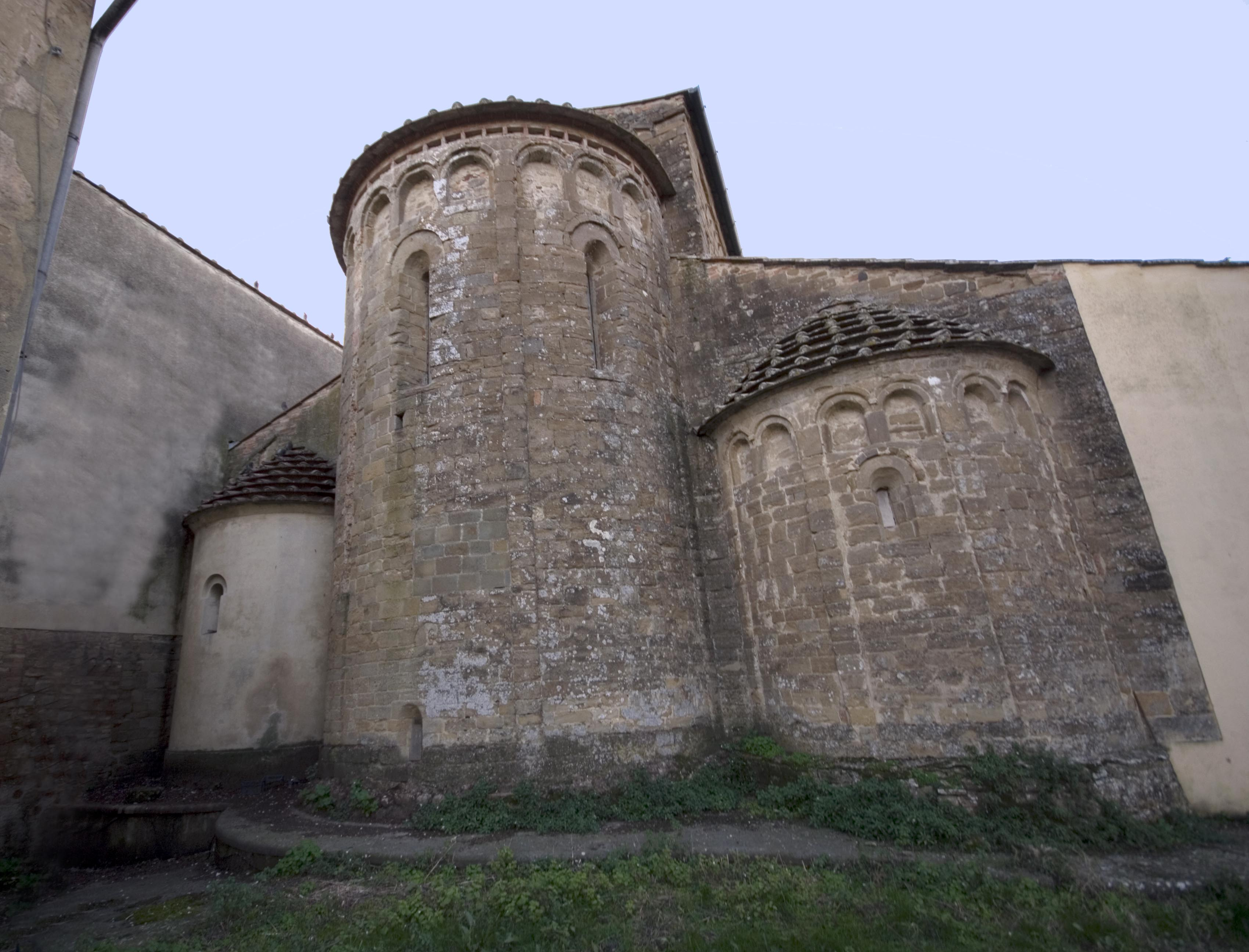 Abside della chiesa di San Lazzaro a Lucardo (Certaldo)